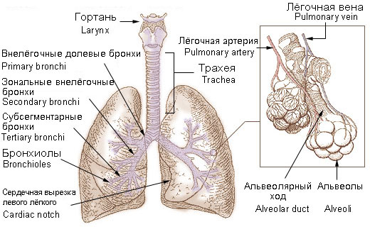 Bronchi, bronchial tree, and lungs (+ Russian translation) Бронхи, бронхиальное дерево, лёгкие